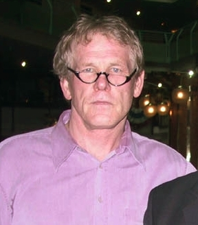 Nick Nolte, Filmschauspieler, 3. Juli 2003